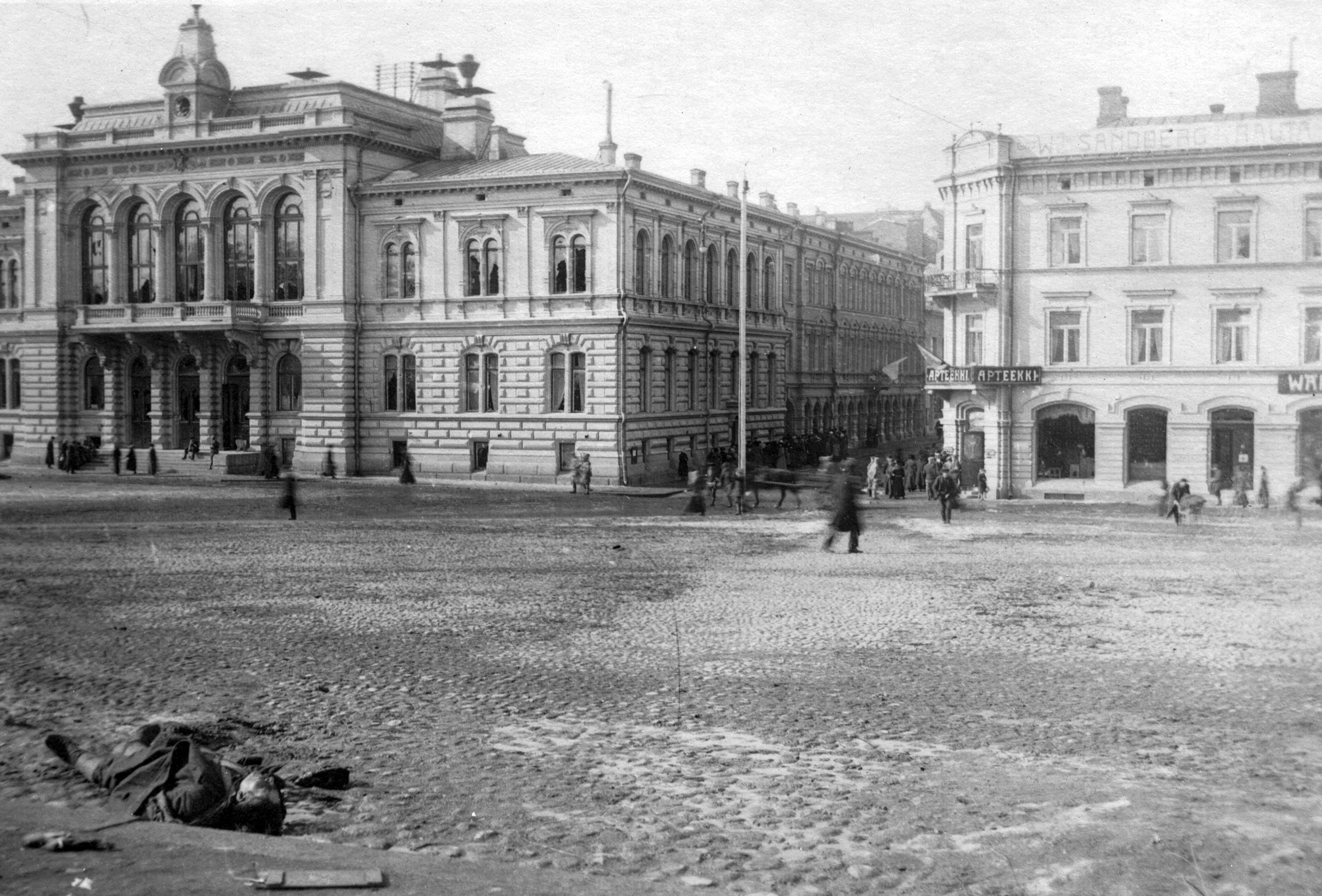 CC-BY Tampere 1918, kuvaaja tuntematon, Vapriikin kuva-arkisto. Finnish Civil War 1918, Photographer unknown, Vapriikki Photo Archives.